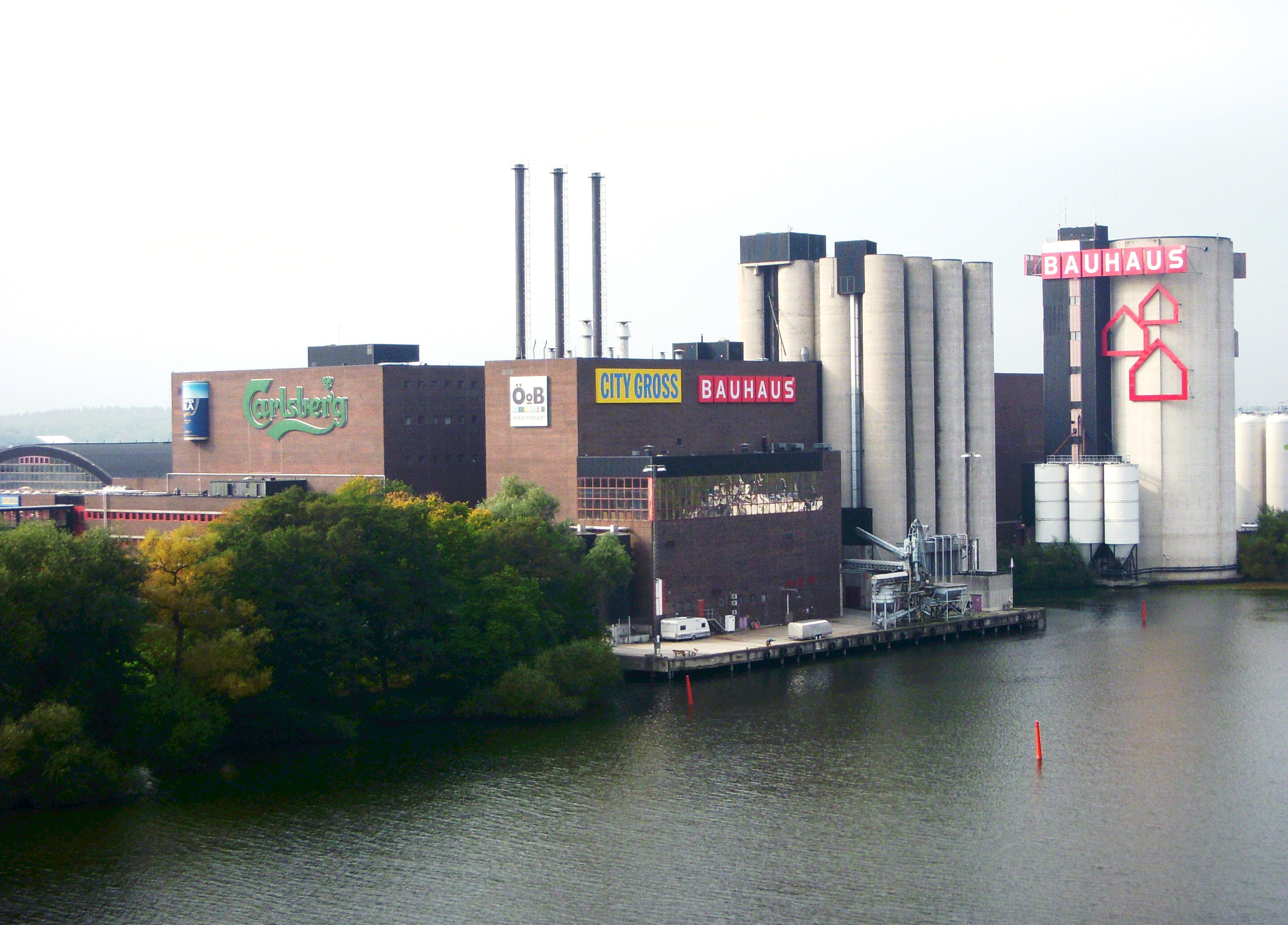 Pripps-byggnaden, Ulvsunda industriområde, arkitekt Anders Berg